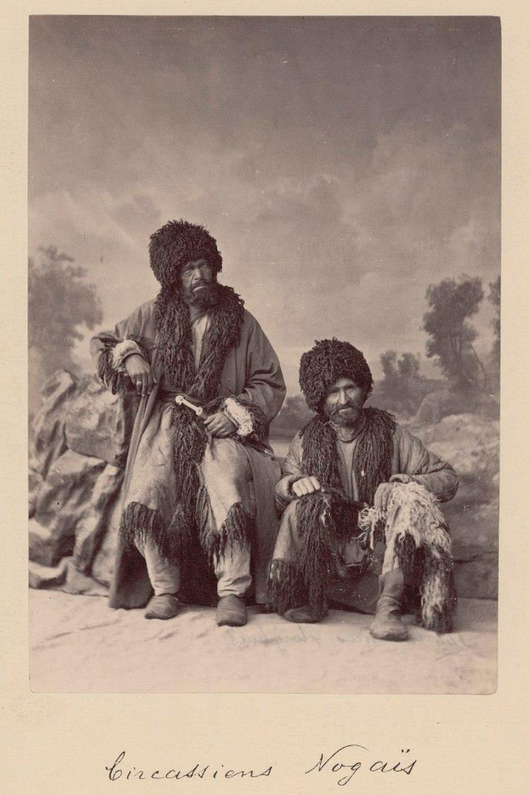 Стамбул, 1882 год.